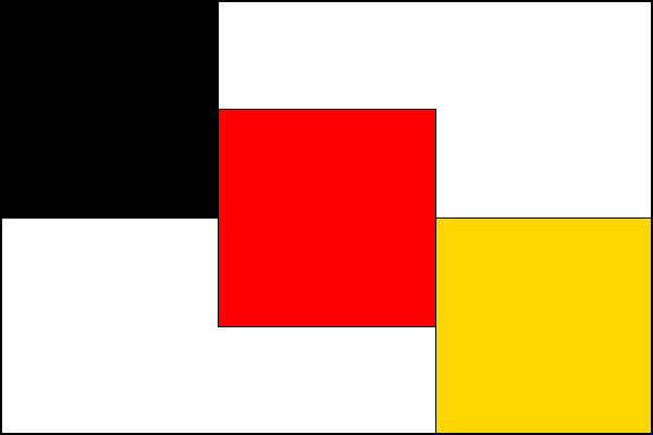 vlajka, Mirošov, okres Žďár nad Sázavou